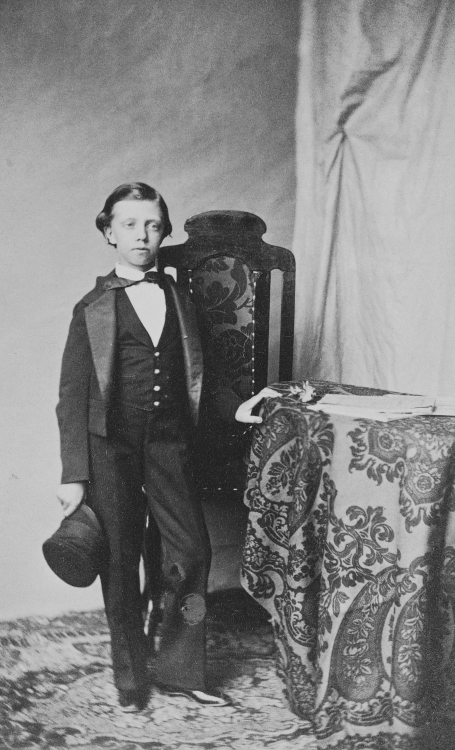 Duca di Parma e Piacenza.